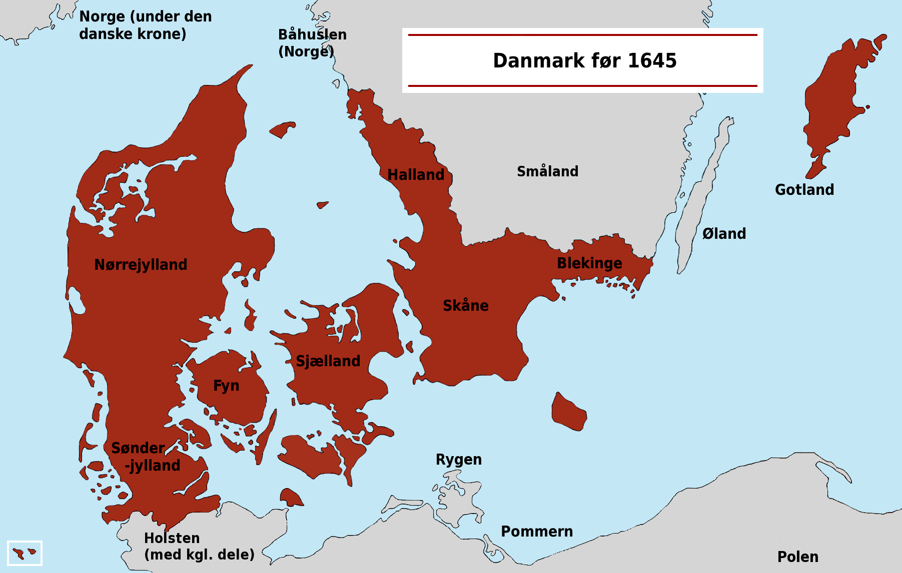 Danmark før 1645